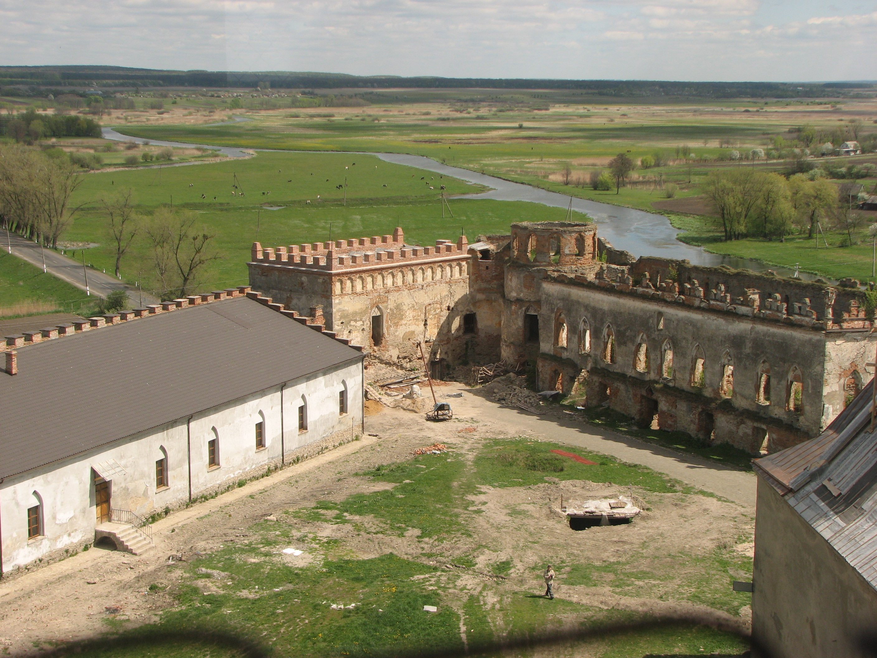 Меджибіж. Замок.